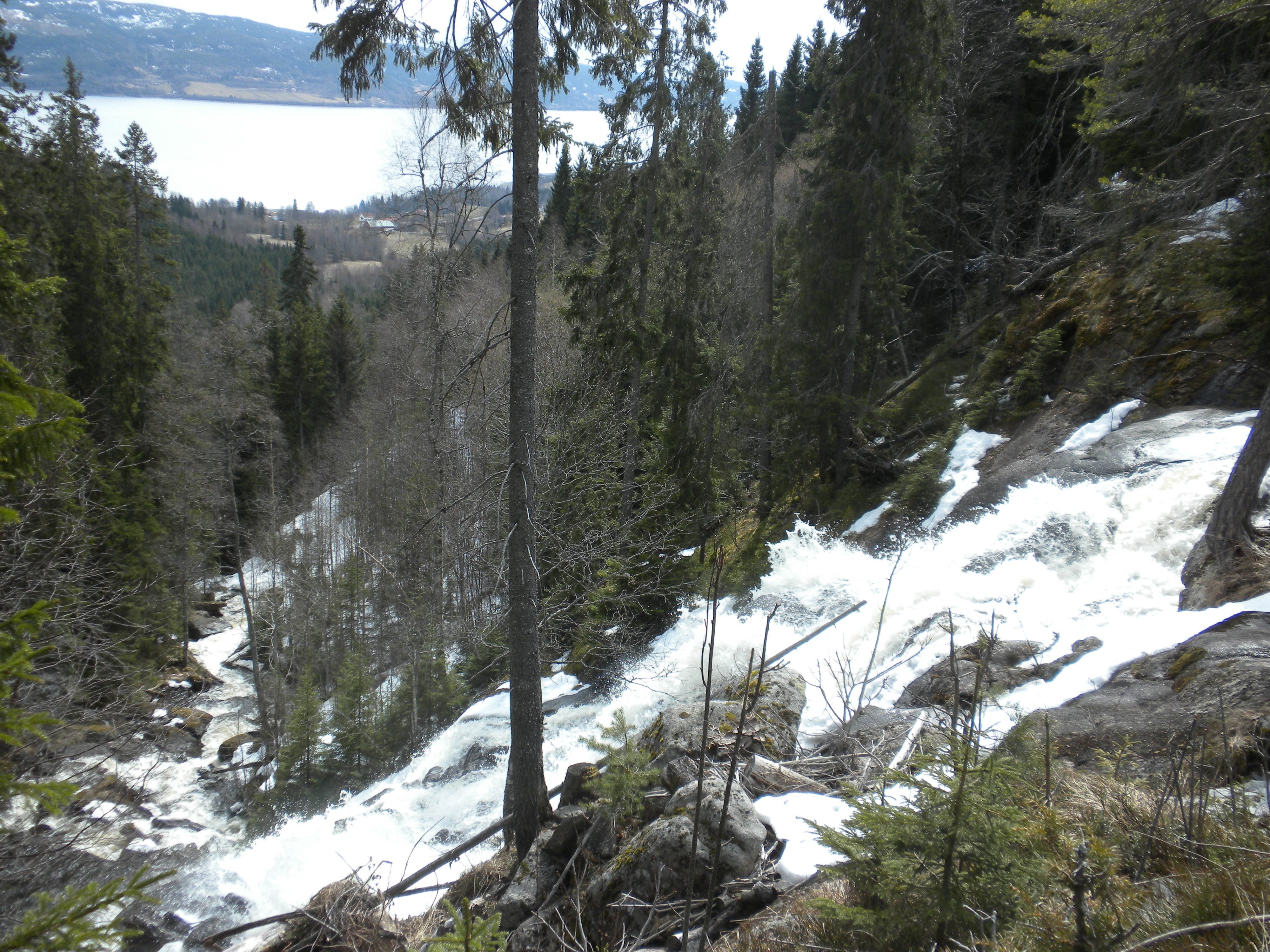 Fossefall i Feiring i Eidsvoll kommune, Norge